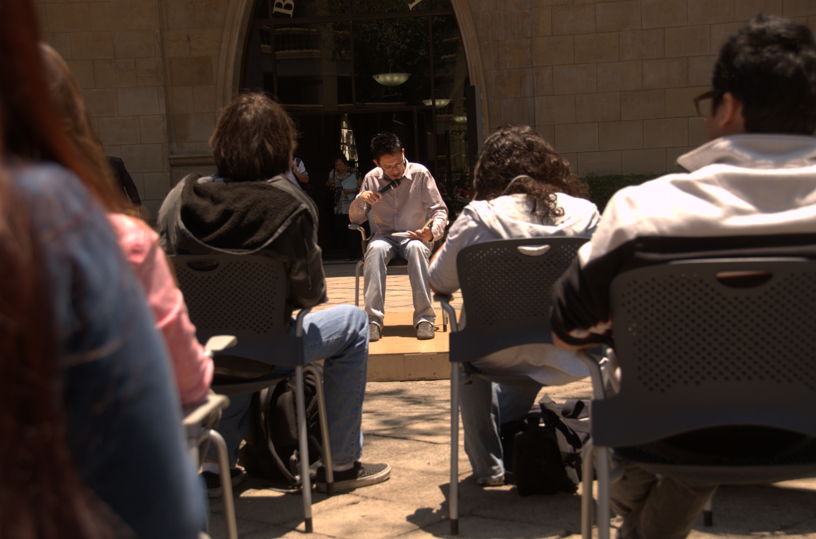 Foro “Lectura en Voz Alta” en la biblioteca del ITESM Campus Ciudad de México en relación al Día Internacional del Libro